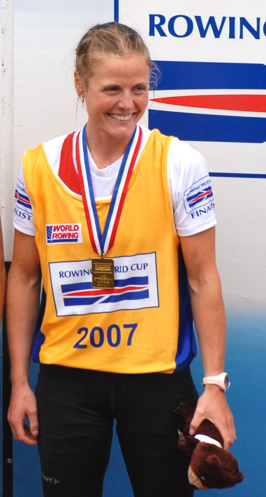 Katrin Olsen als Siegerin des Ruder-Weltcups 2007 im Doppelzweier in Ottensheim bei Linz